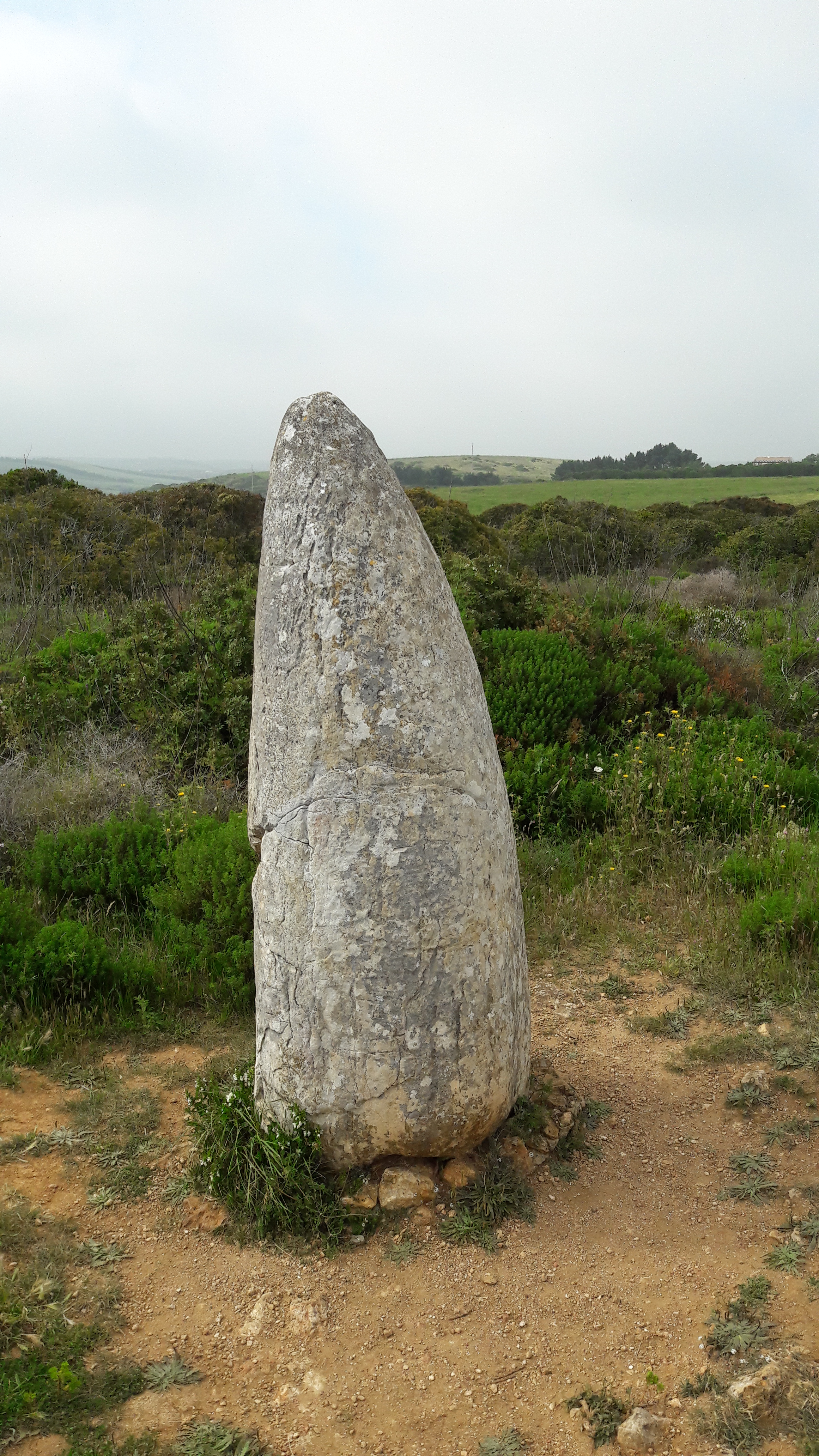 Menir de Padrão, Raposeira - Vila do Bispo. 08-05-2018